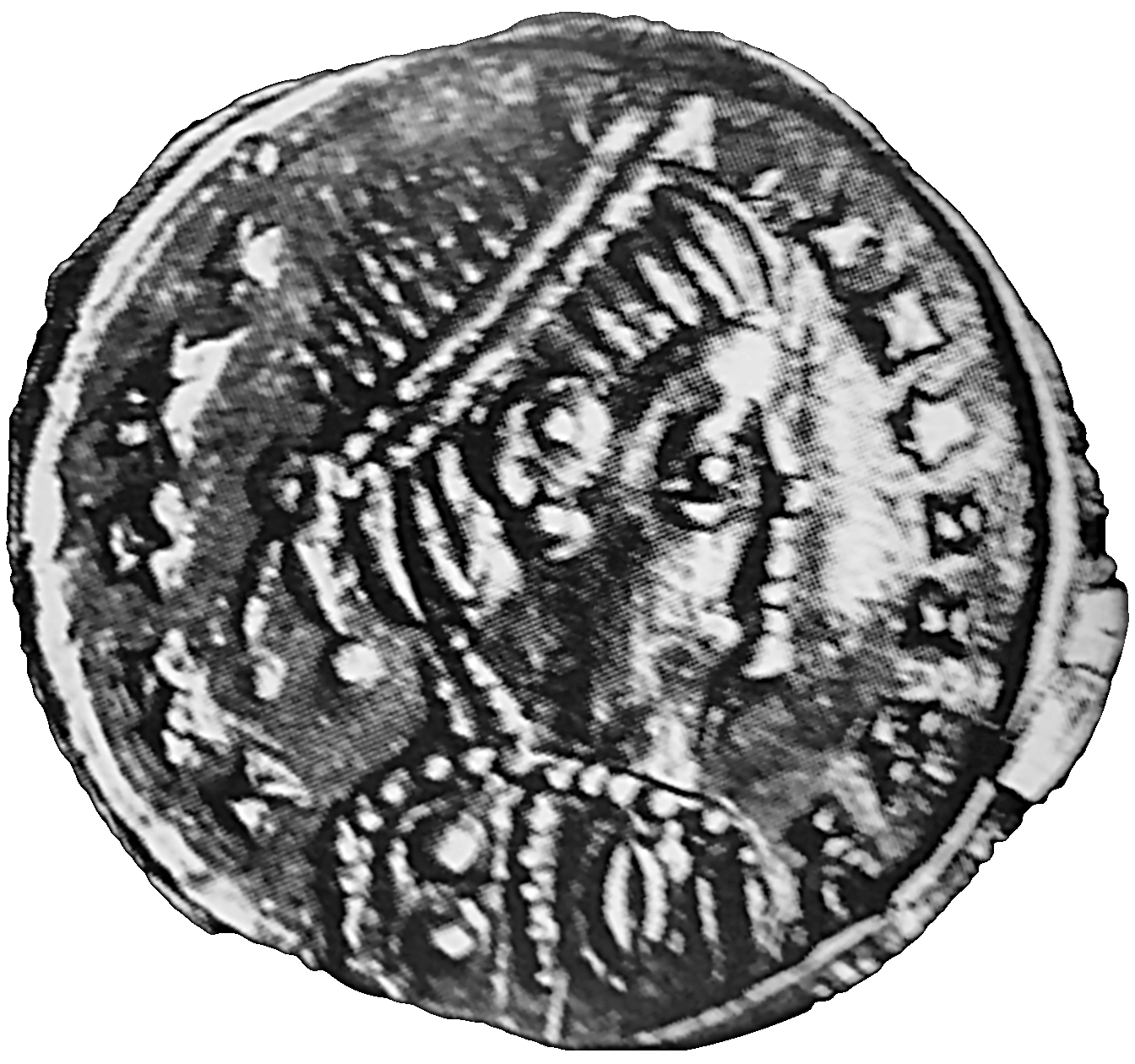 Monnaie d'argent de Clotaire Ier, frappée à l'imitation des monnaies des Ostrogoths. Bibliothèque nationale, cabinet des médailles.